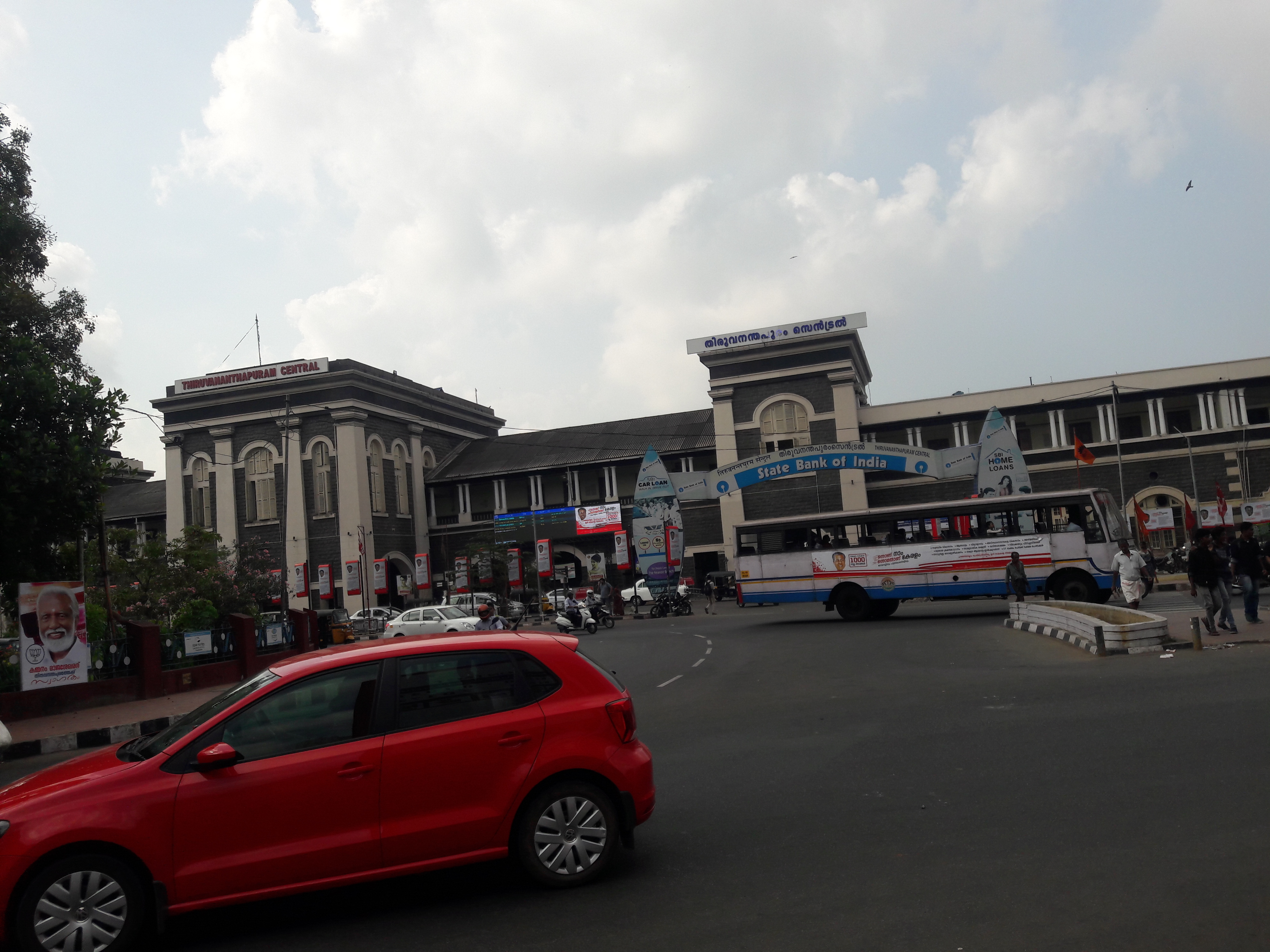 തിരുവനന്തപുരം സെൻട്രൽ തീവണ്ടിനിലയം